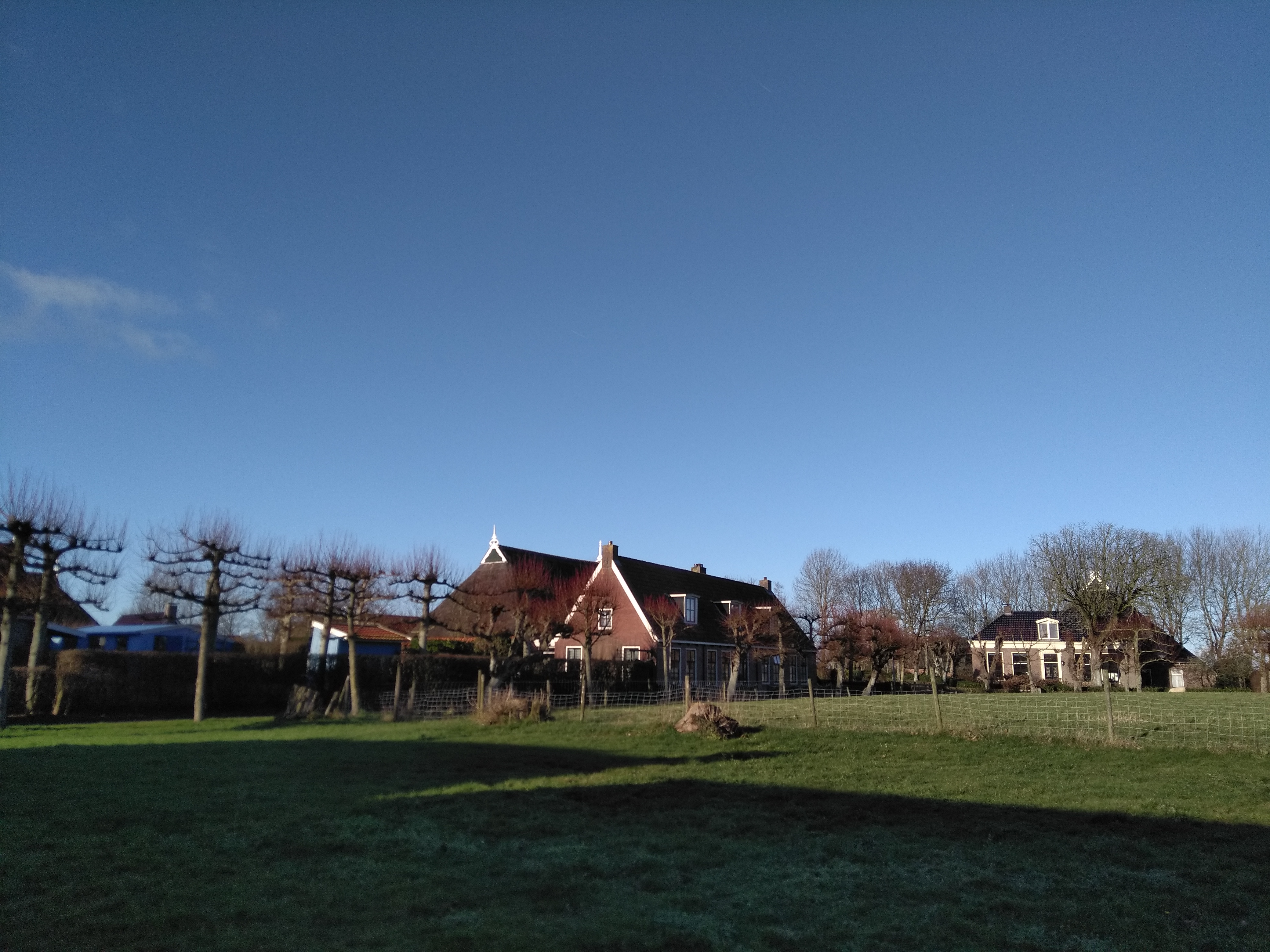 Zicht op een paar woningen op de terp van Niawier, Noardeast-Fryslân.